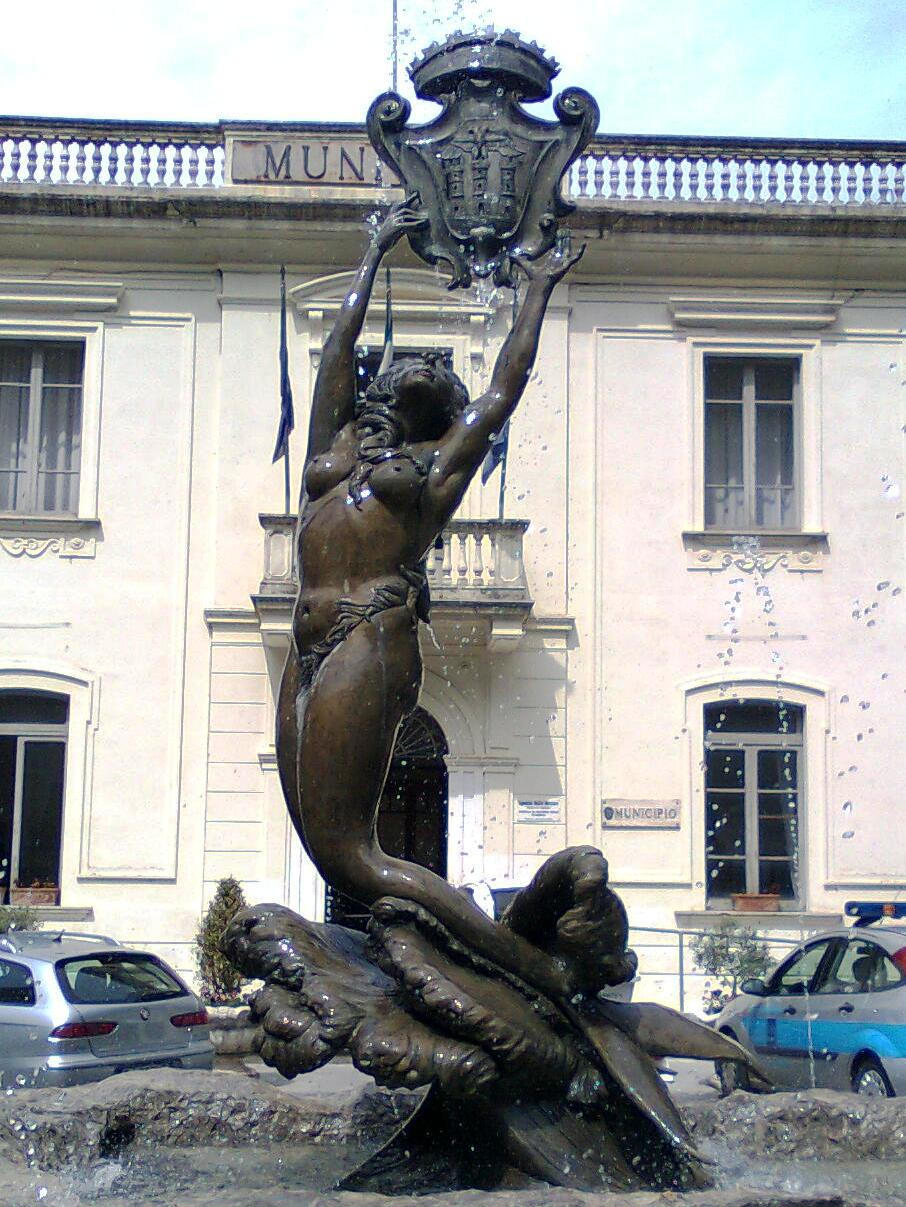 Fontana della Sirena nella piazza Vitolo di Maratea.